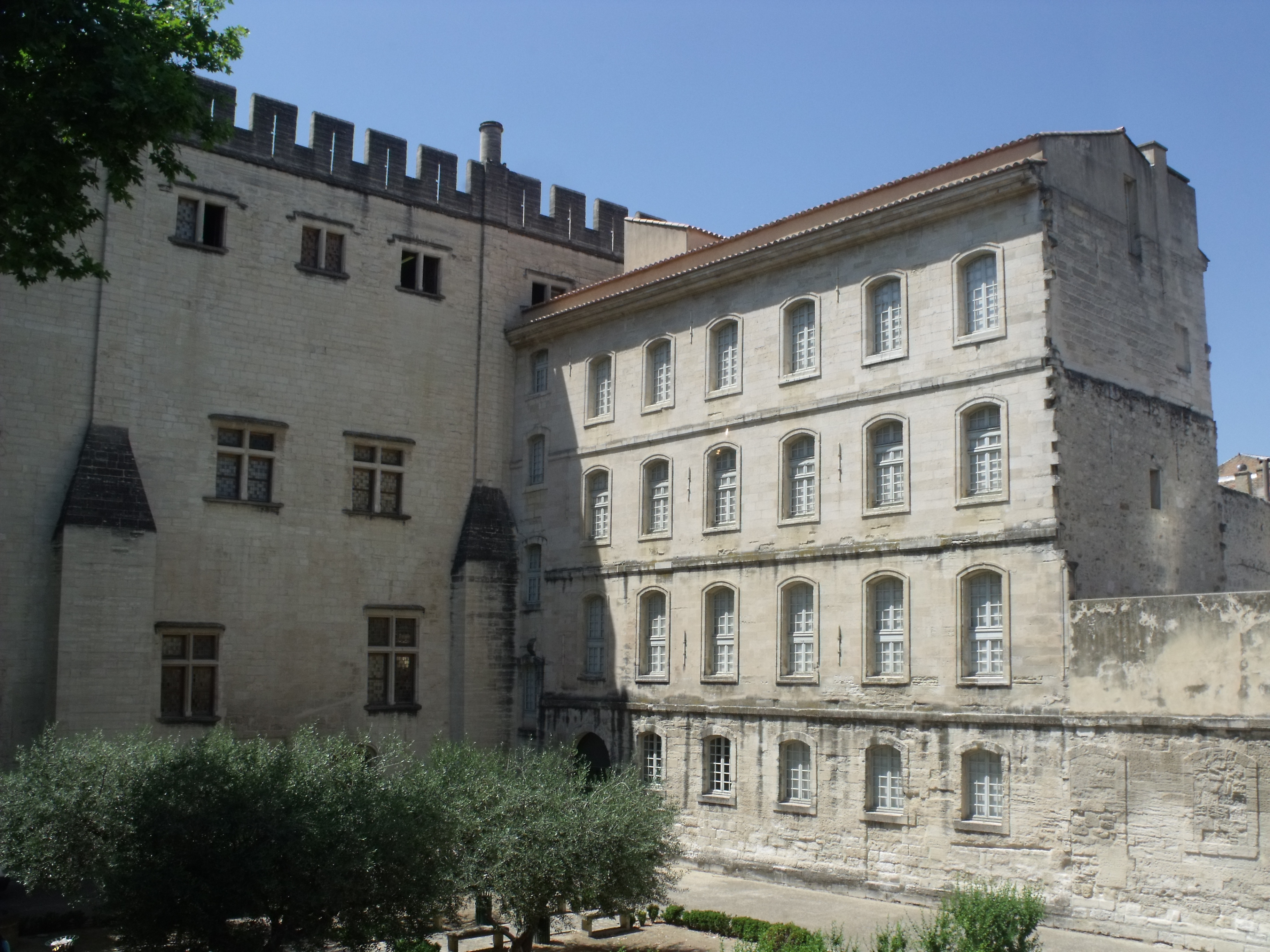 Livrée Annibal de Ceccano où résidèrent les cardinaux Arnaud Novel, Pierre d'Arrablay, Bertrand de Deaux, Francesco degli Atti, Androin de la Roche, Bernard du Bosquet, Giacomo Orsini et Pierre de la Vergne